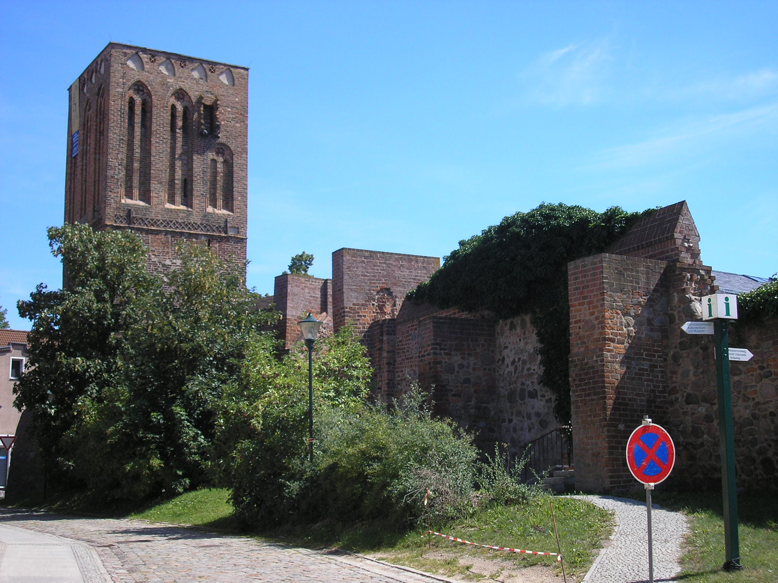 Das Schwedter Tor in Prenzlau (Brandenburg).